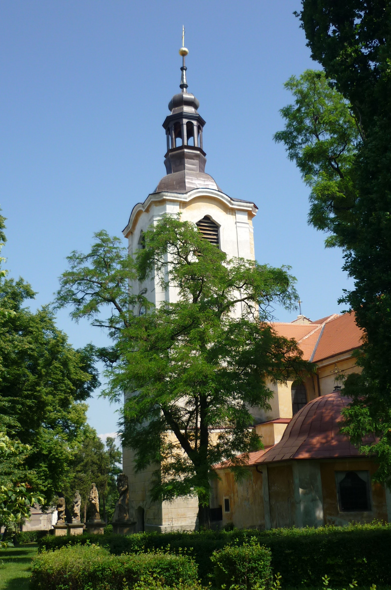 Pfarr- und Wallfahrtskirche in Liebeschitz